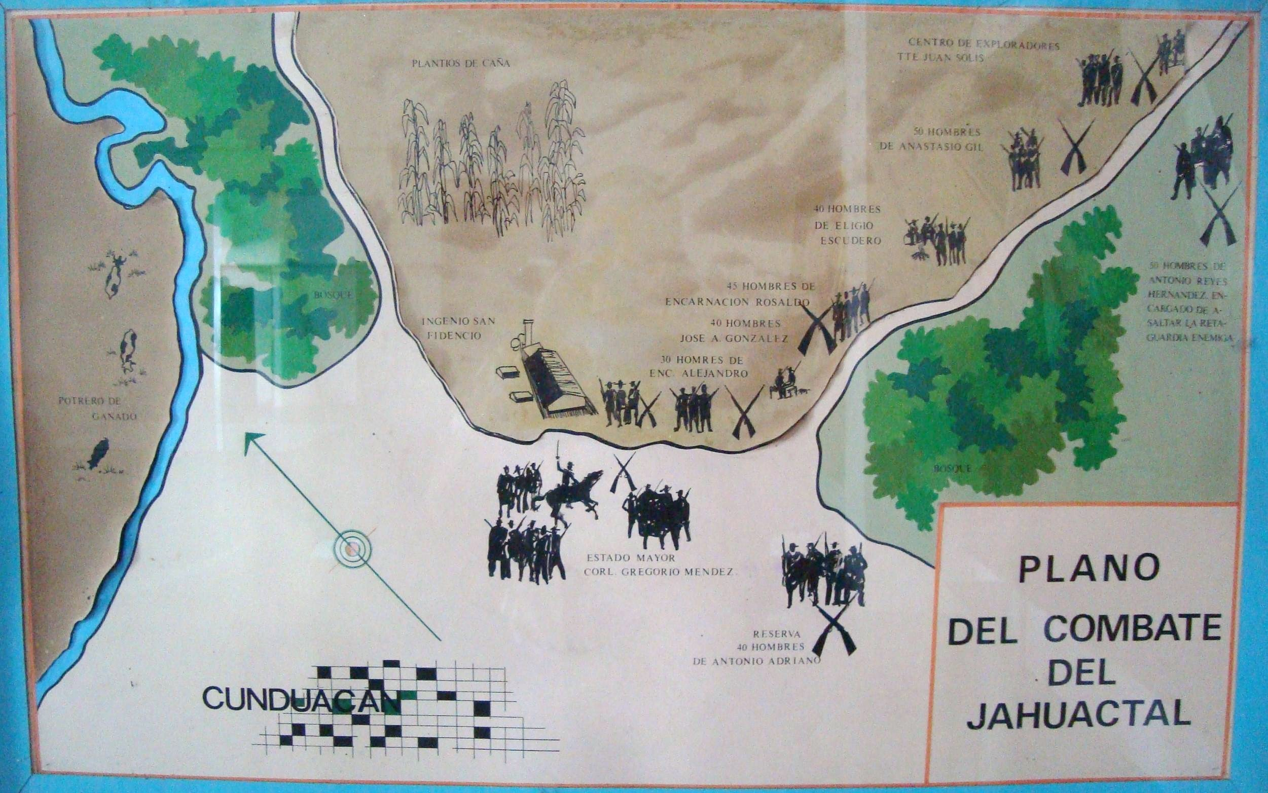 Plano de la "Batalla de El Jahuactal" escenificada el 1 de noviembre de 1863 entre el Ejercito Liberal Tabasqueño comandado por el Cnel. Gregorio Méndez Magaña, y las fuerzas intervencionistas francesas, durante la intervención francesa en Tabasco.